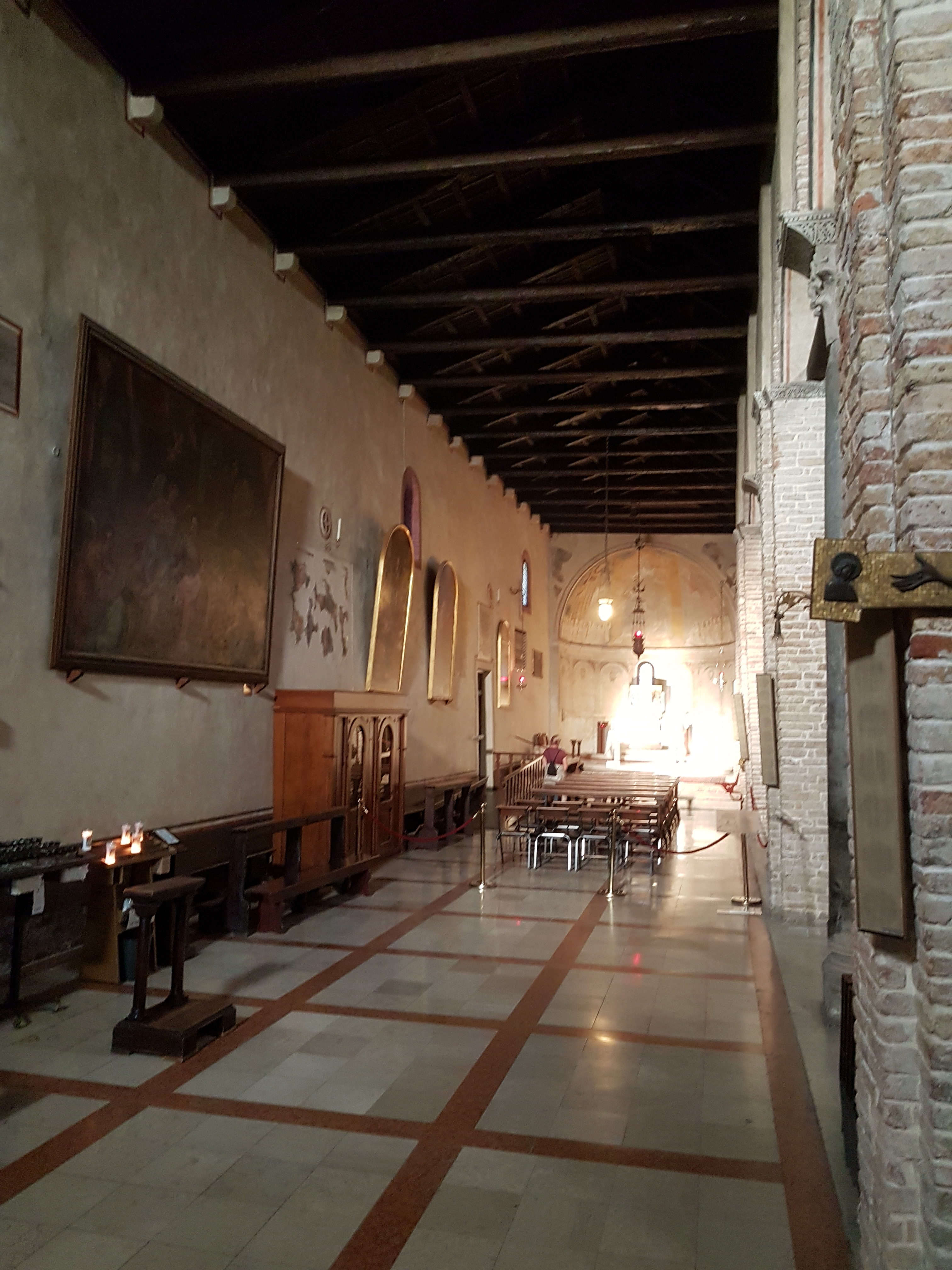 Duomo di Caorle